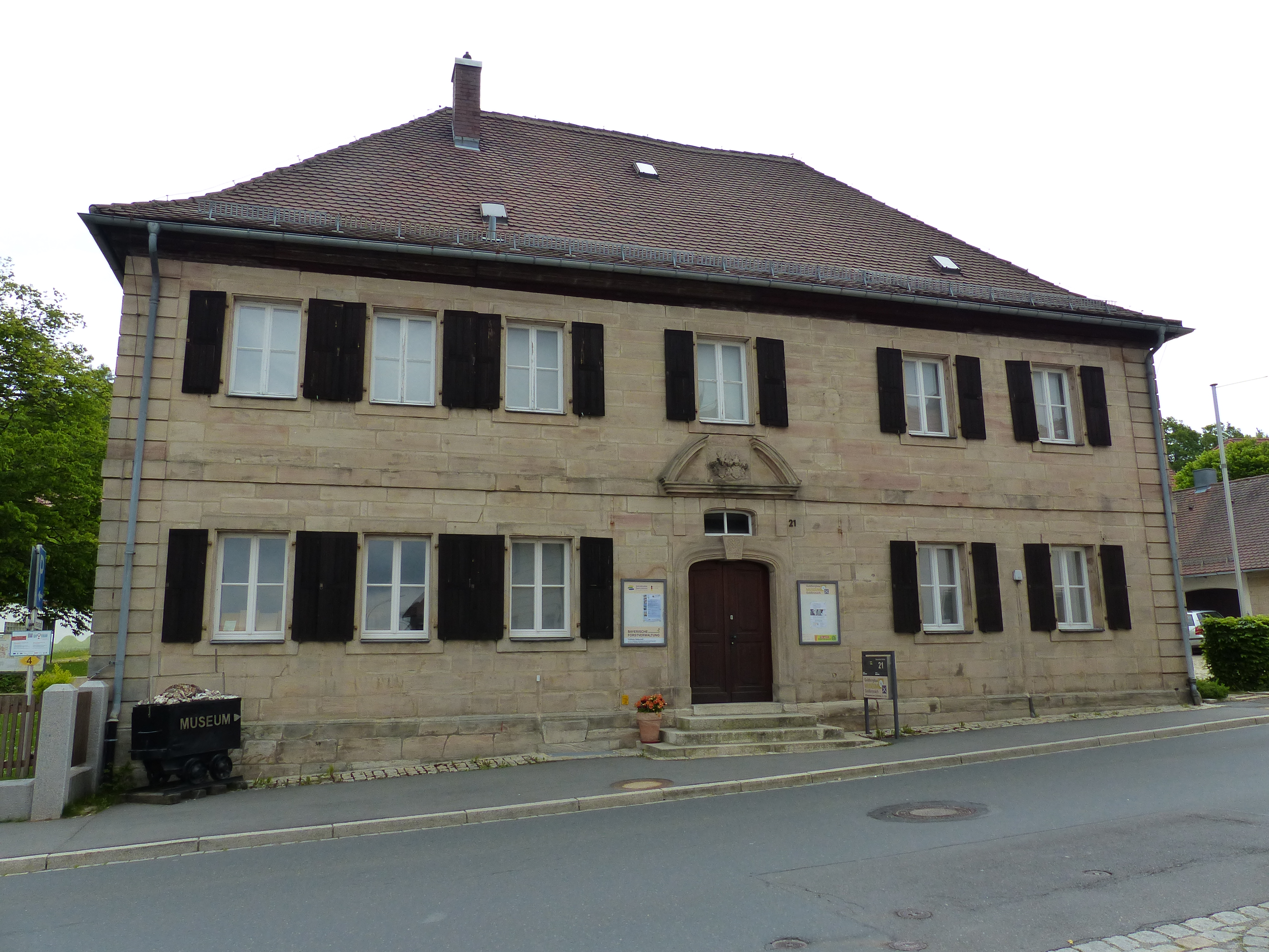 Goldkronach, ehemaliges Forsthaus, jetzt Goldbergbaumuseum